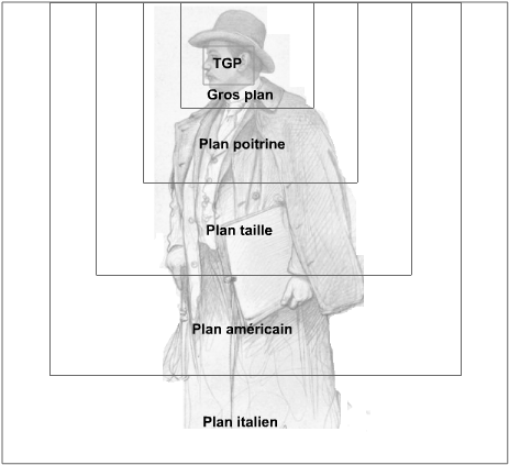 Cadre plan: TGP (Très gros plan), Gros plan, Plan poitrine, Plan taille, Plan américain, Plan italien